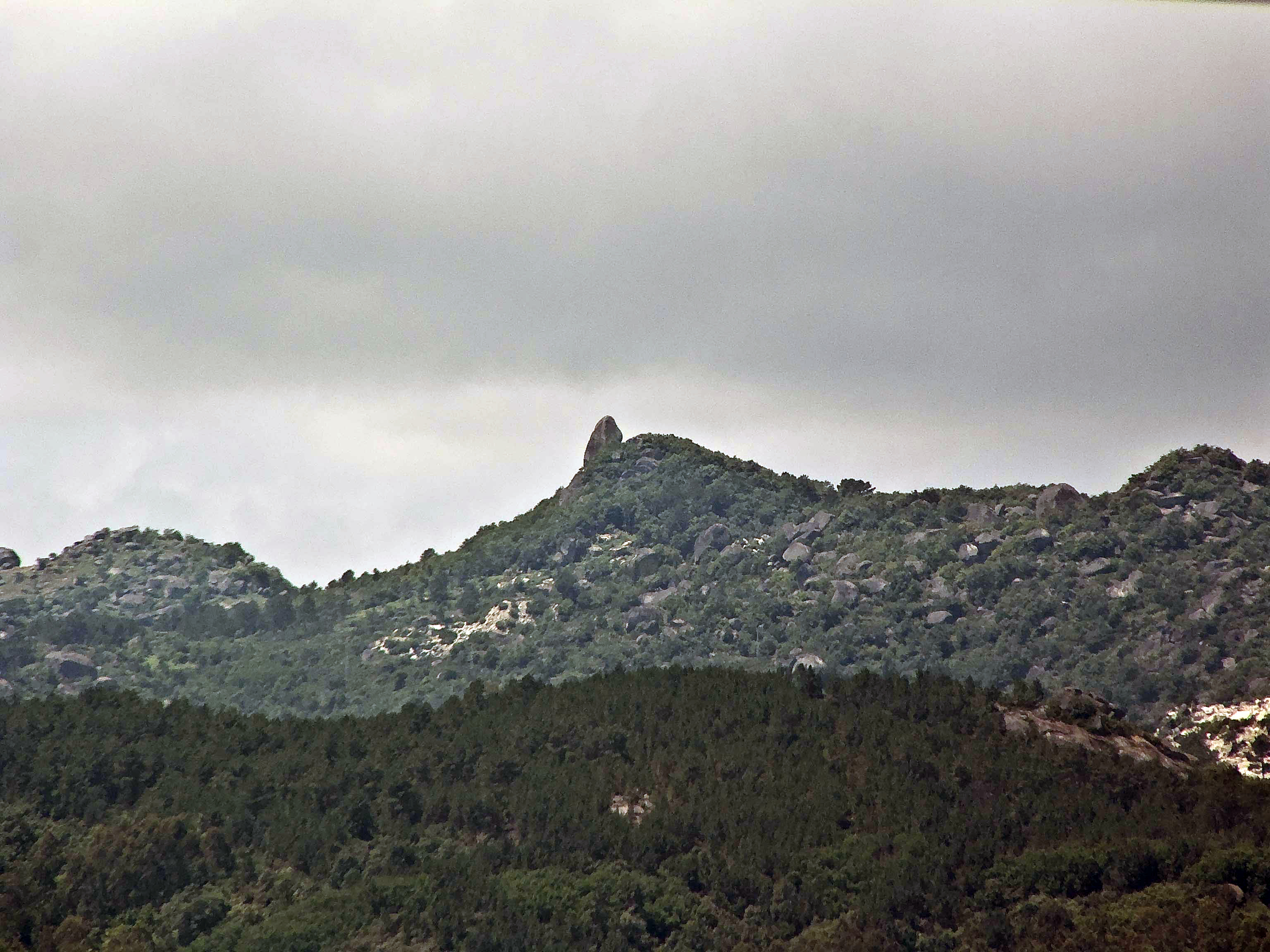 Pena Corneira desde San Miguel de Osmo, (Cenlle)